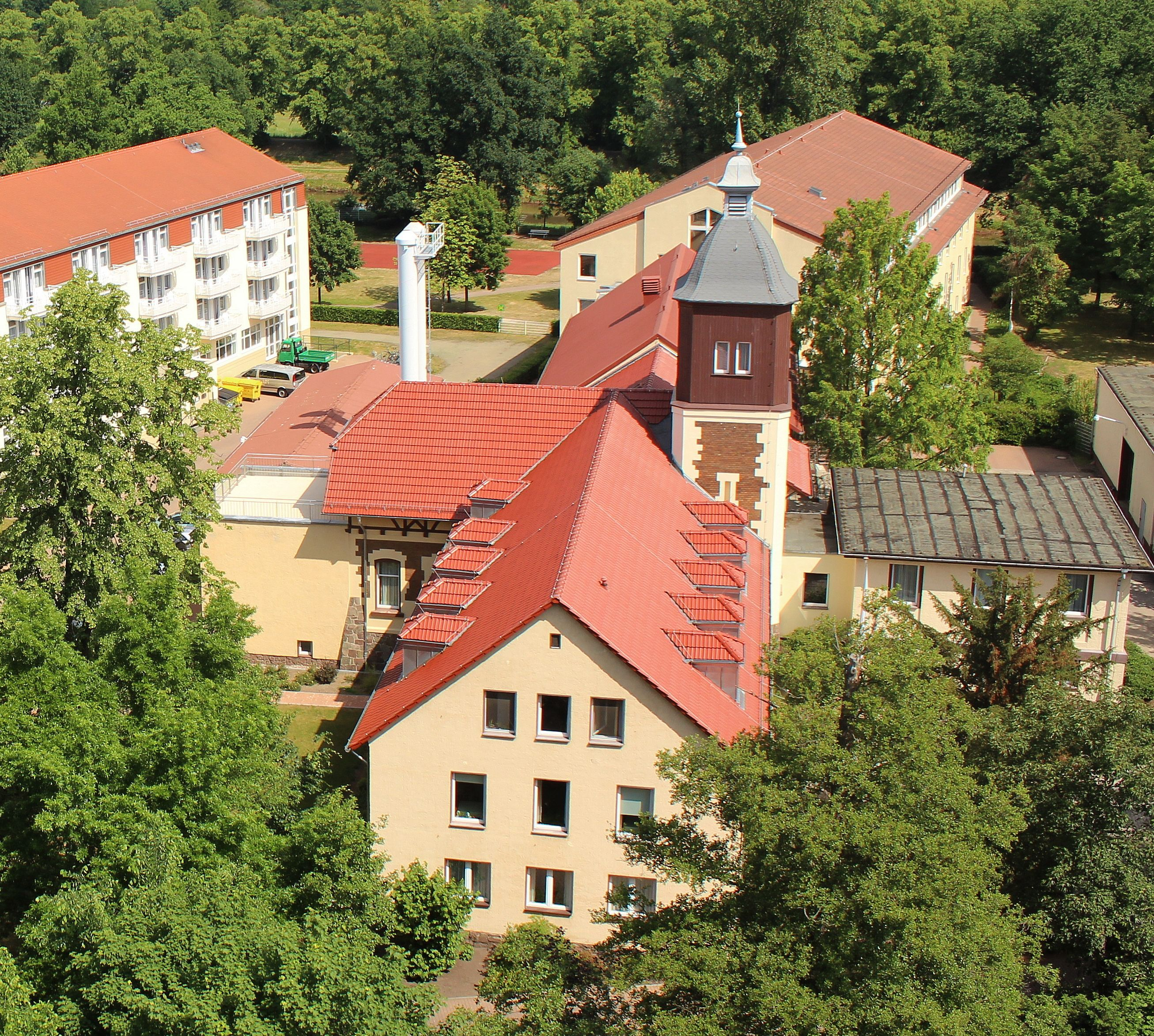 Das Moorbad in Bad Liebenwerda vom Lubwartturm gesehen.